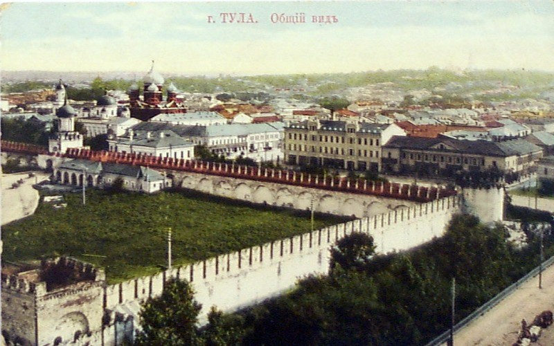 Фотография Тульского кремля начала XX века